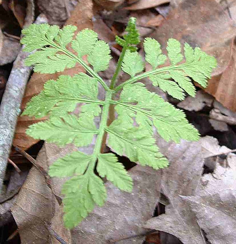 Botrychium lunarioides, Gadsden Co. FL USA